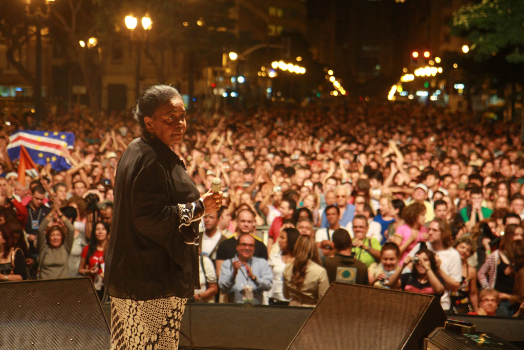 Foto: Caio Paganotti